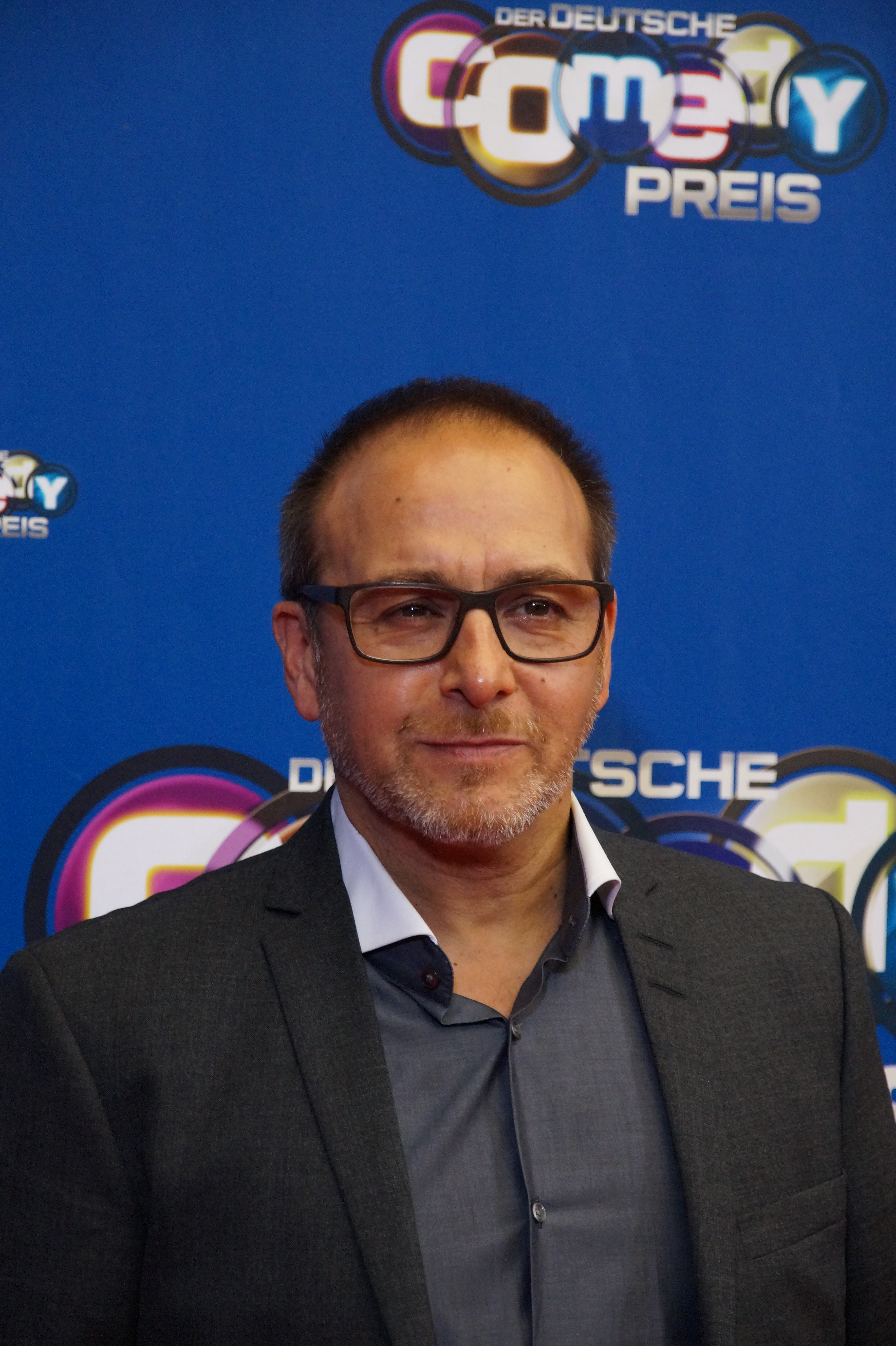 Erdoğan Atalay beim Comedypreis 2016, im Oktober 2016, Köln.